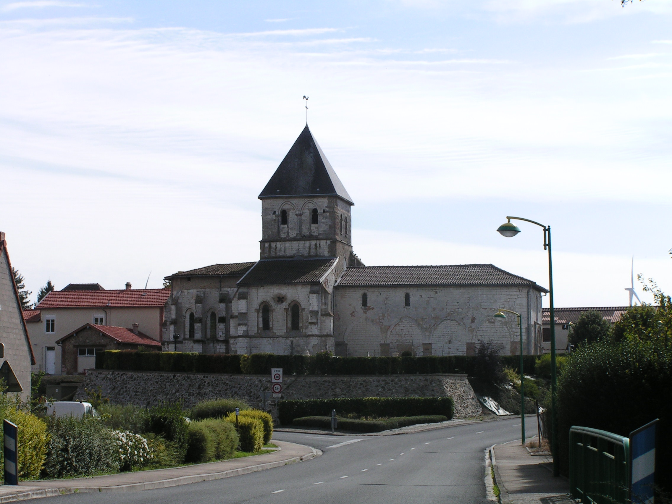 Église Notre-Dame de Dampierre-sur-Moivre (Classé) .